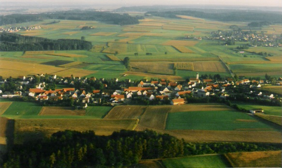 Aulzhausen (Gemeinde Affing) : Südansicht oben links: Anwalting (Affing) // oben mittig: Salzbergkapelle // oben rechts: Gebenhofen (Affing)